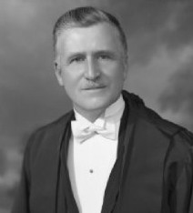 Lucien Borne (1884-1954). Maire de Québec de 1938 à 1953.